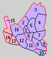 群馬県佐波郡の町村。